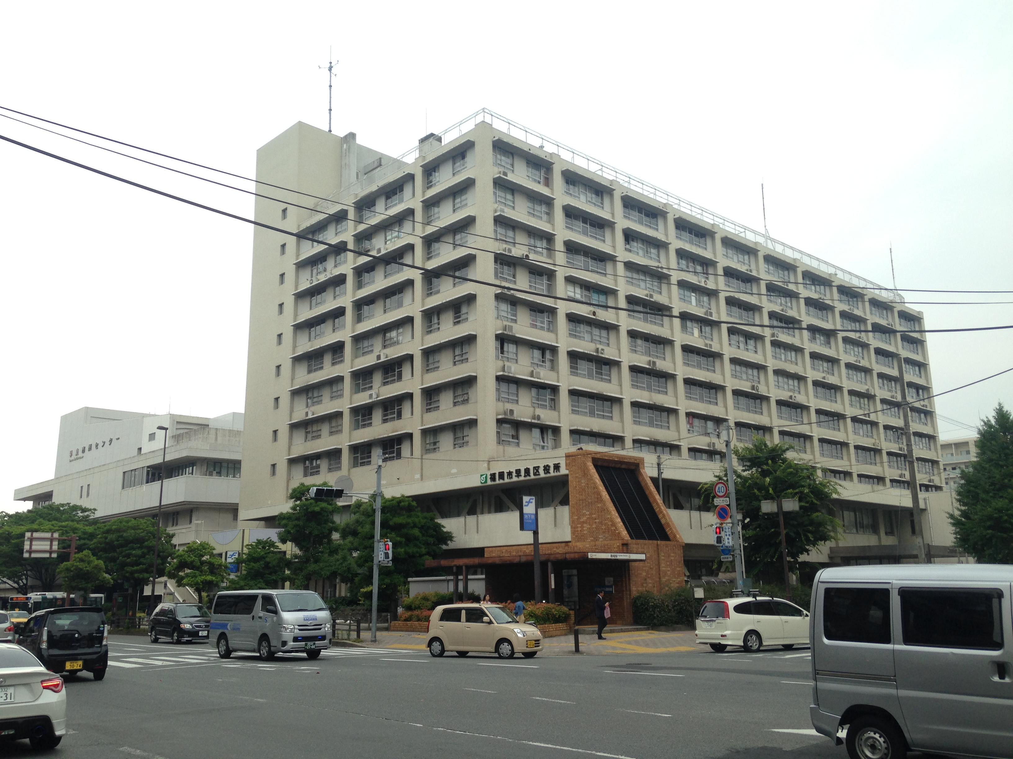 福岡市早良区役所と早良市民センター